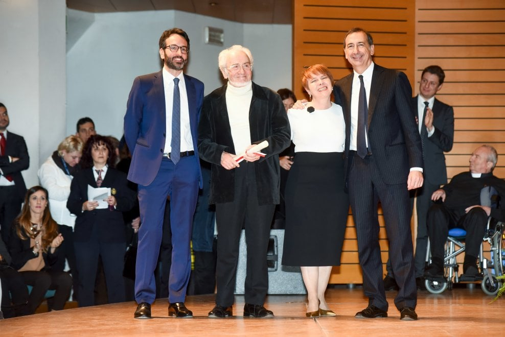 Consegna dell'Ambrogino d'oro al Teatro Officina